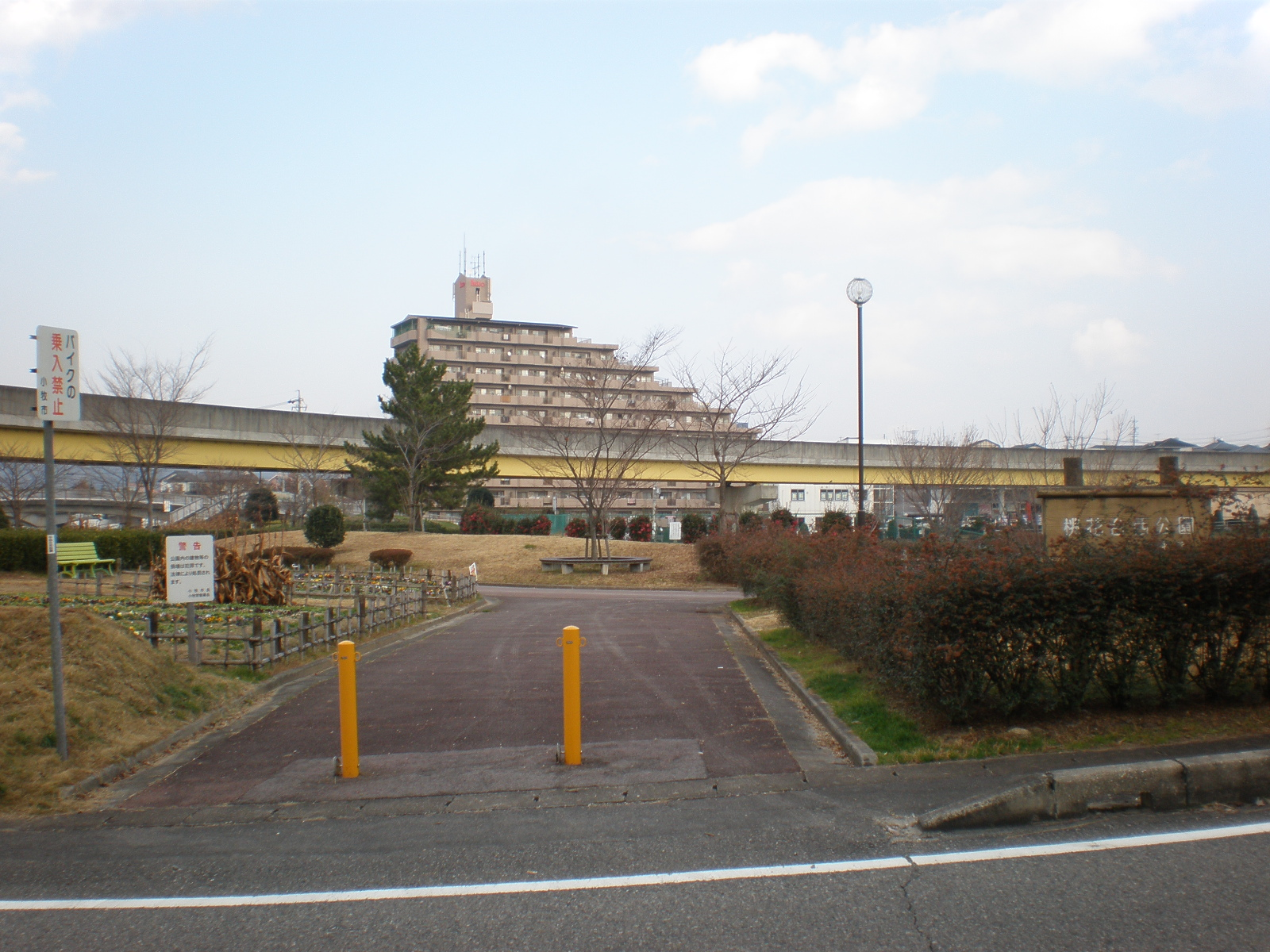 愛知県小牧市にある桃花台西公園